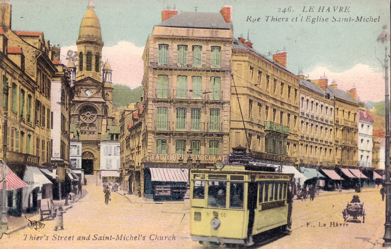 Carte postale ancienne éditée par ELD pour F. au Havre : LE HAVRE - Rue Thiers et l'Eglise Saint-Michel